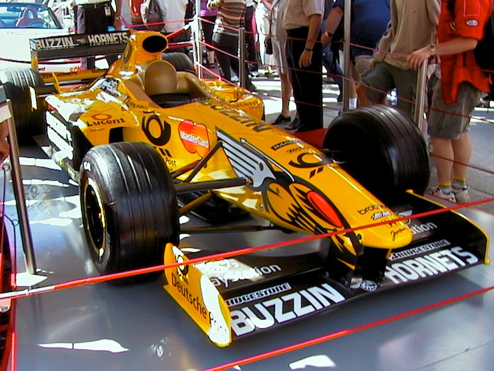 La Jordan EJ10 dans les paddocks du Grand Prix du Canada 2001